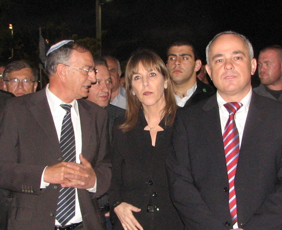 דוד עמר עם לימור לבנת ויובל שטייניץ בטקס הפתיחה של הקנטרי קלאב בנשר